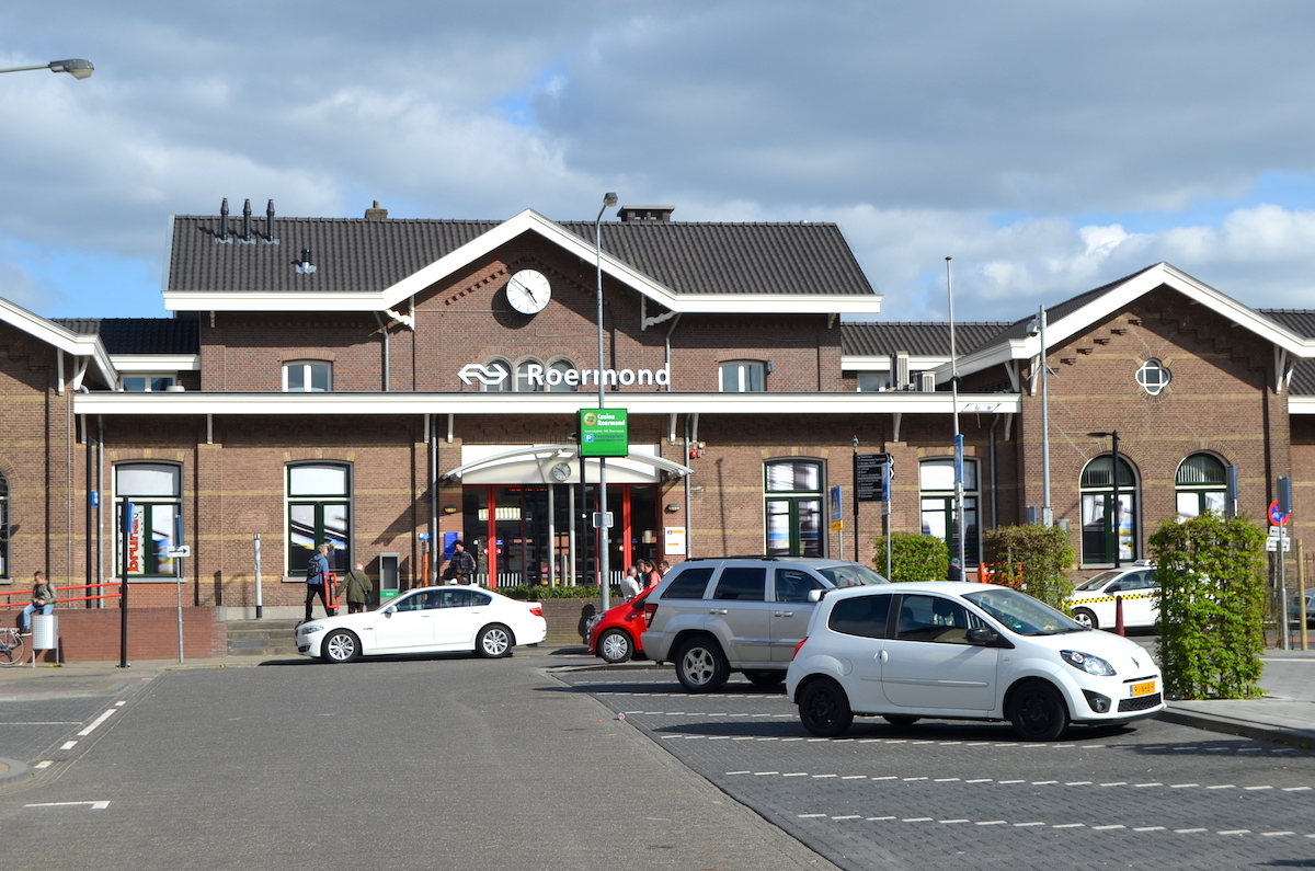 Station Roermond, straatzijde; 17 april 2015. Foto: Erik Swierstra.